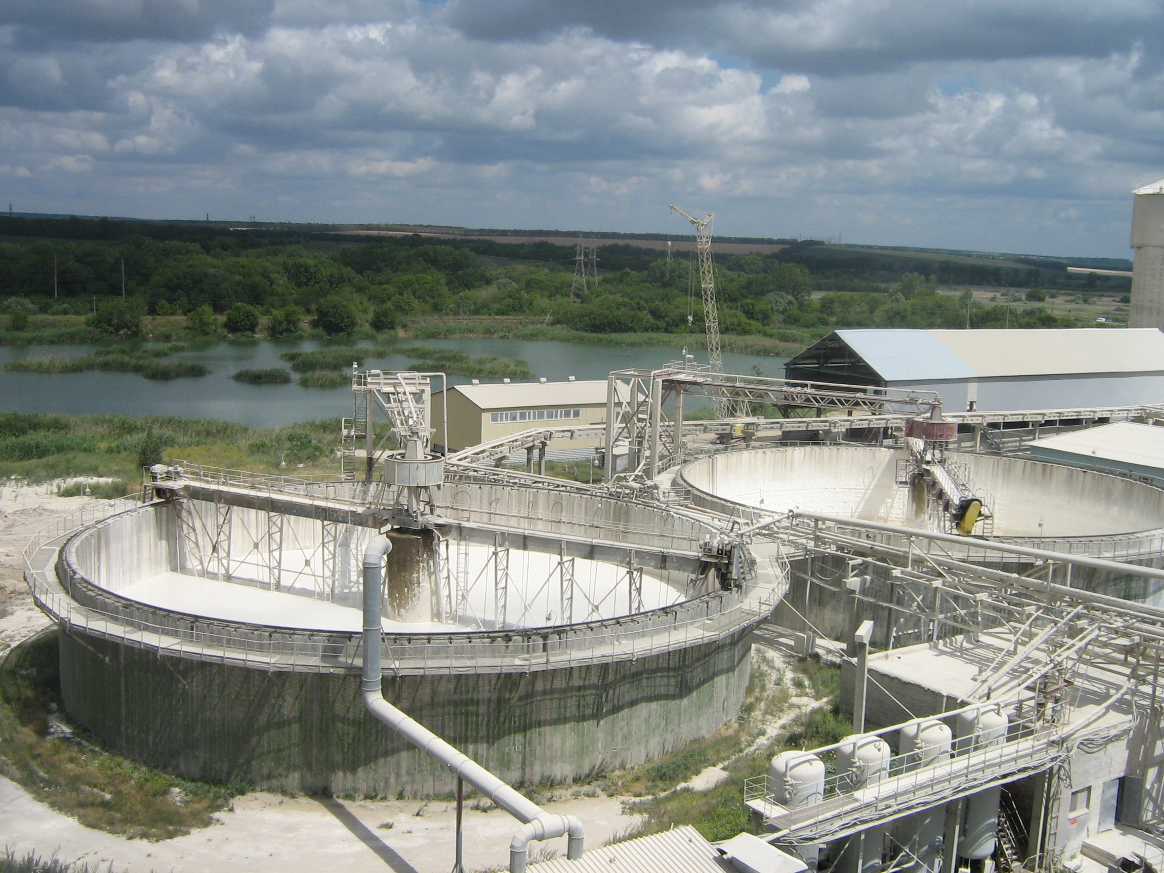 Горизонтальный шламбассейн на заводе Придонхимстройизвесть